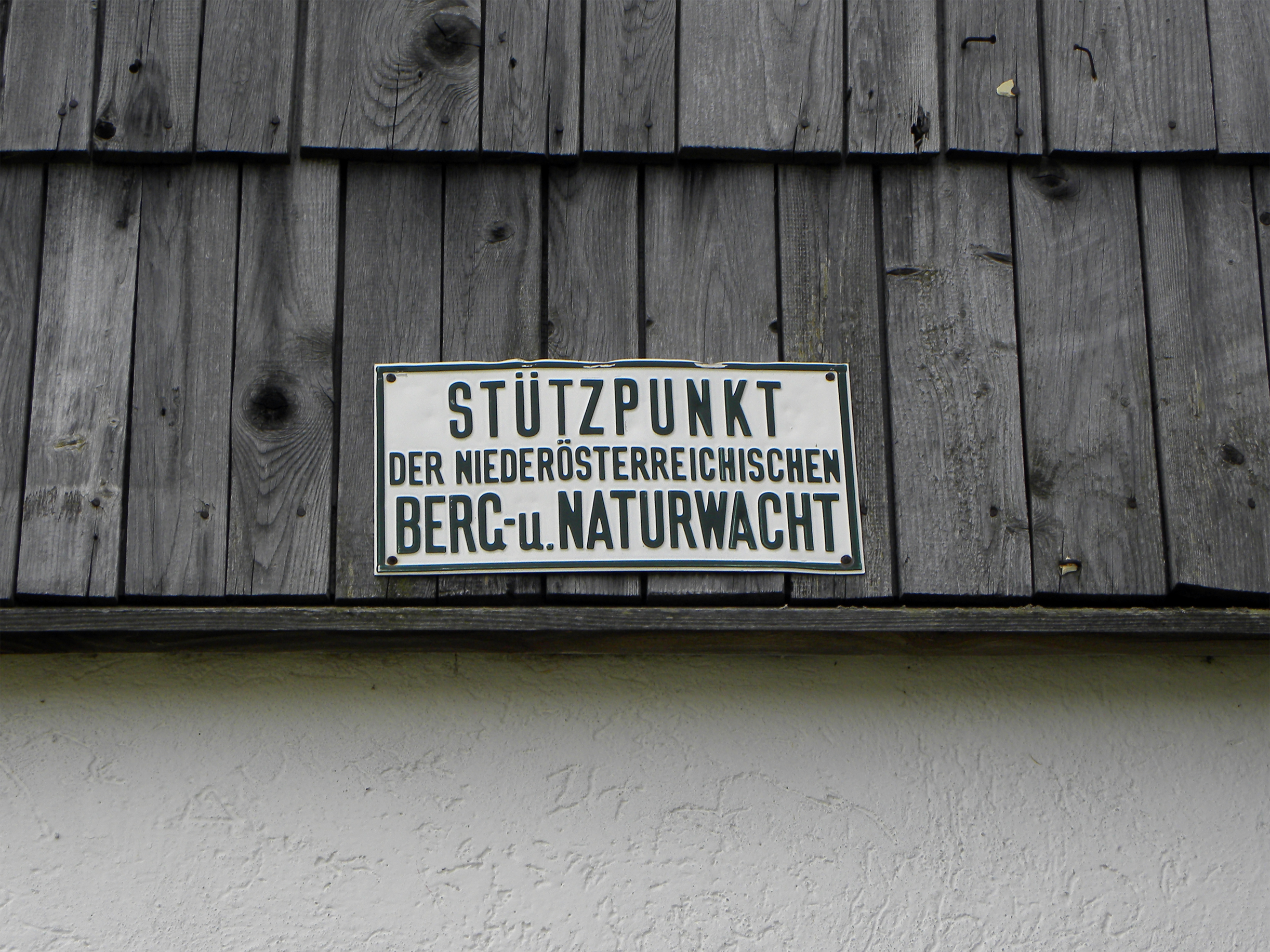 Wanderung von Mönichkirchen über den Hochwechsel nach Mariensee